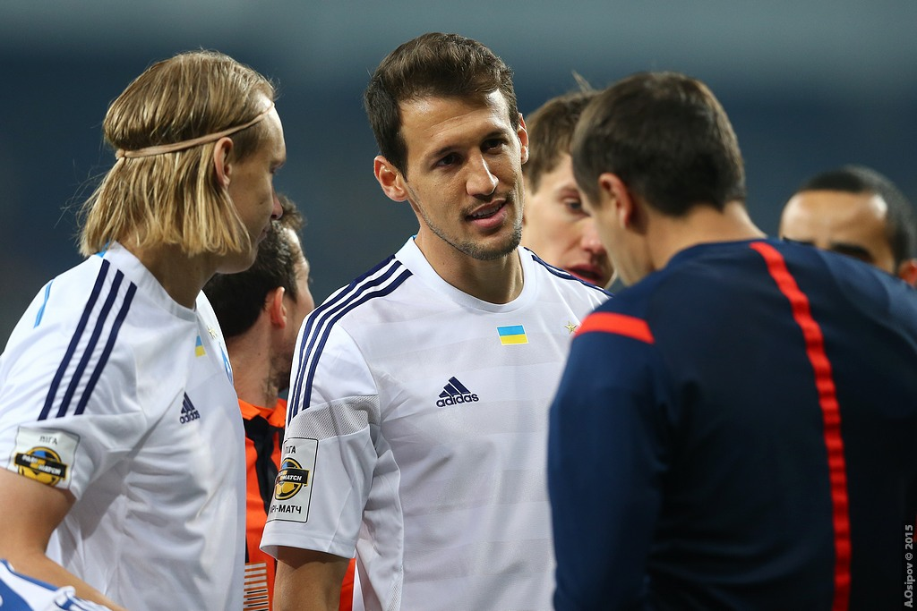 16.10.2015 г.Киев. НСК "Олимпийский". 11-й тур Лиги Пари-Матч. Динамо Киев - Шахтер Донецк - 0:3